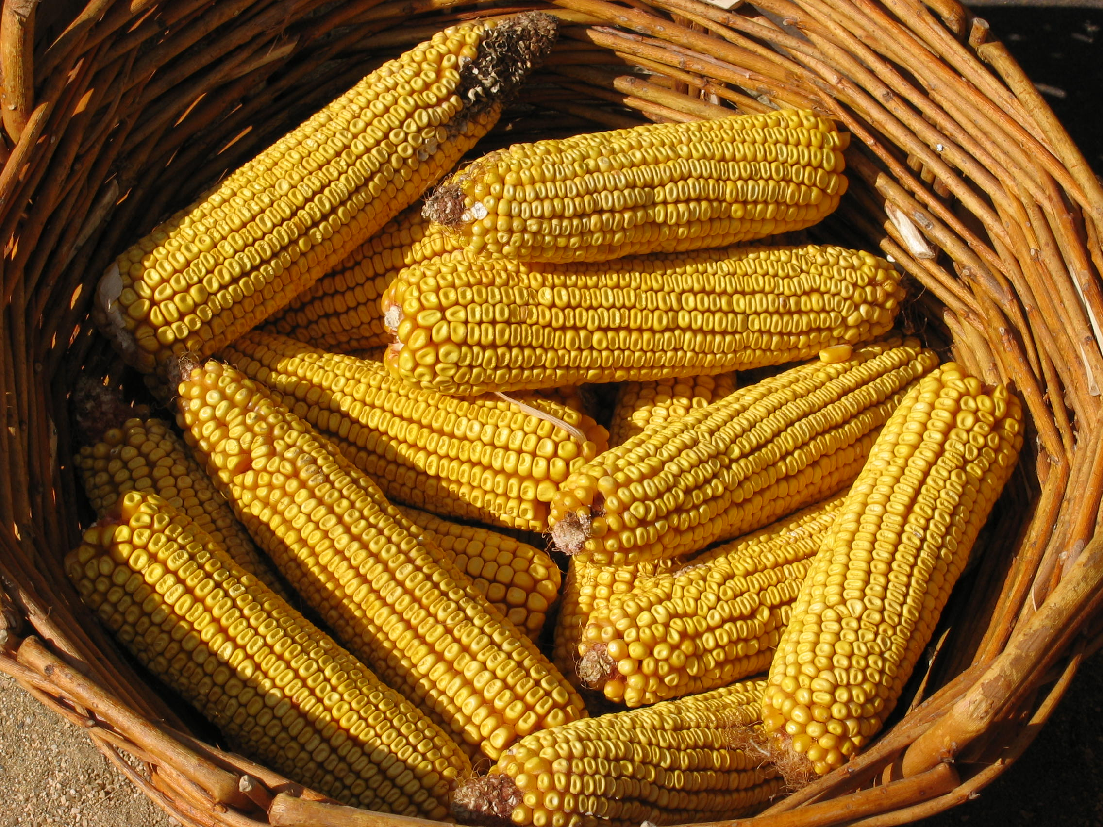 Espigas de millo na feira.